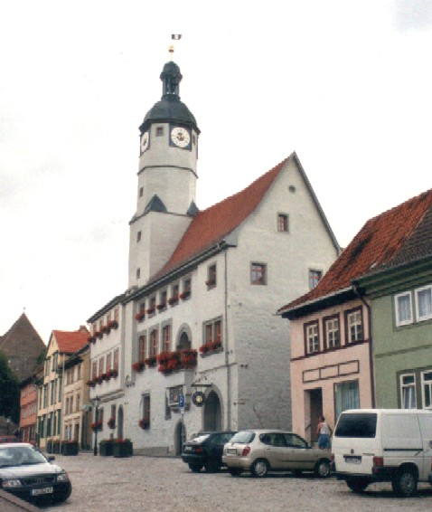 Weißensee - Rathaus